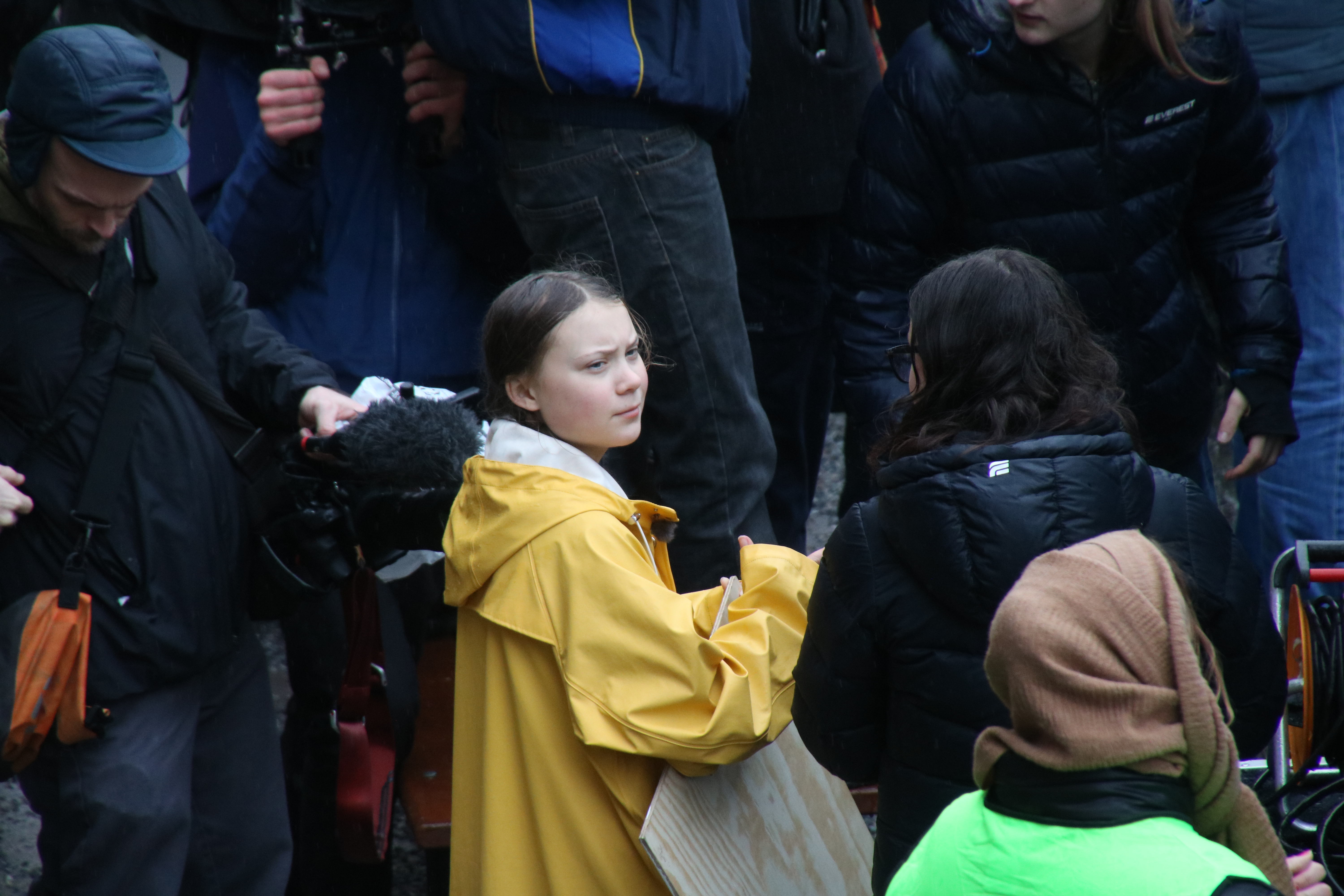 Greta Thunberg på Mynttorget, Stockhom